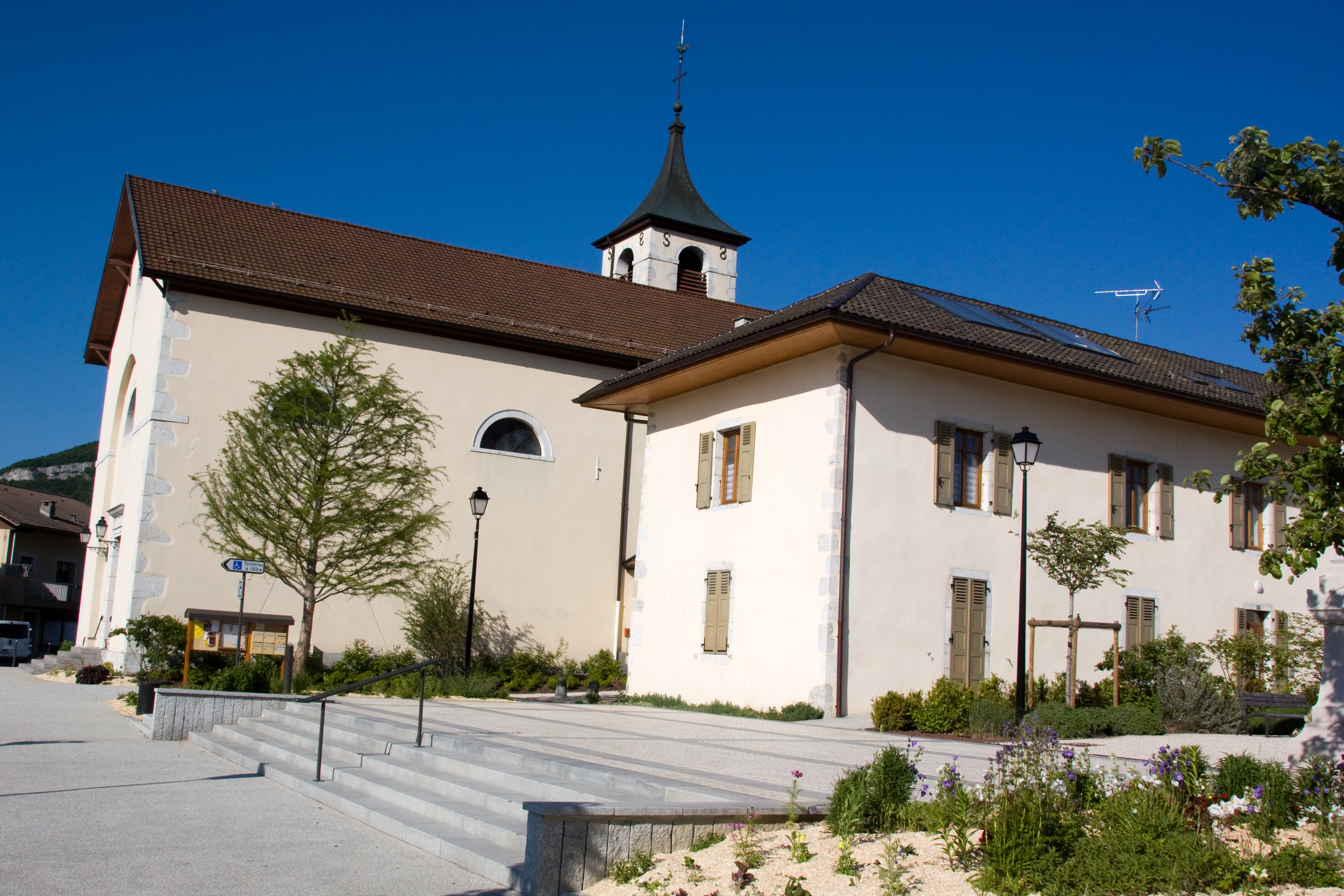 Eglise de Sillingy, Sillingy, Haute-Savoie, France